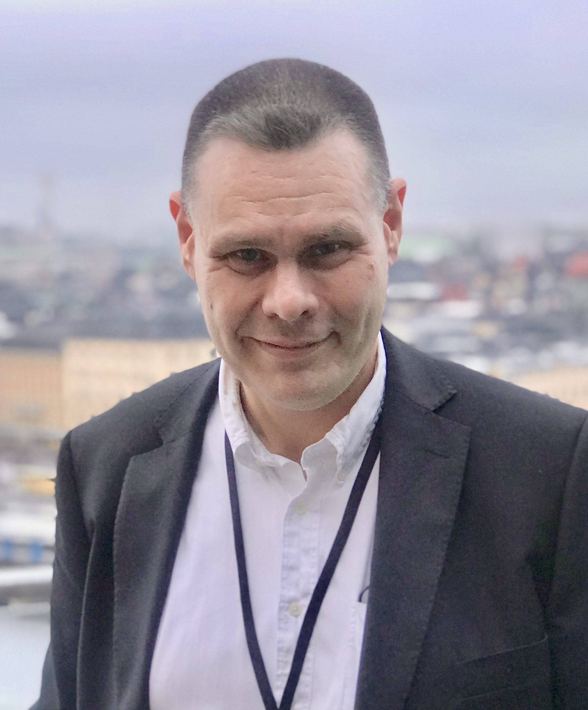 Foto Fredrik Wallén, januari 2019